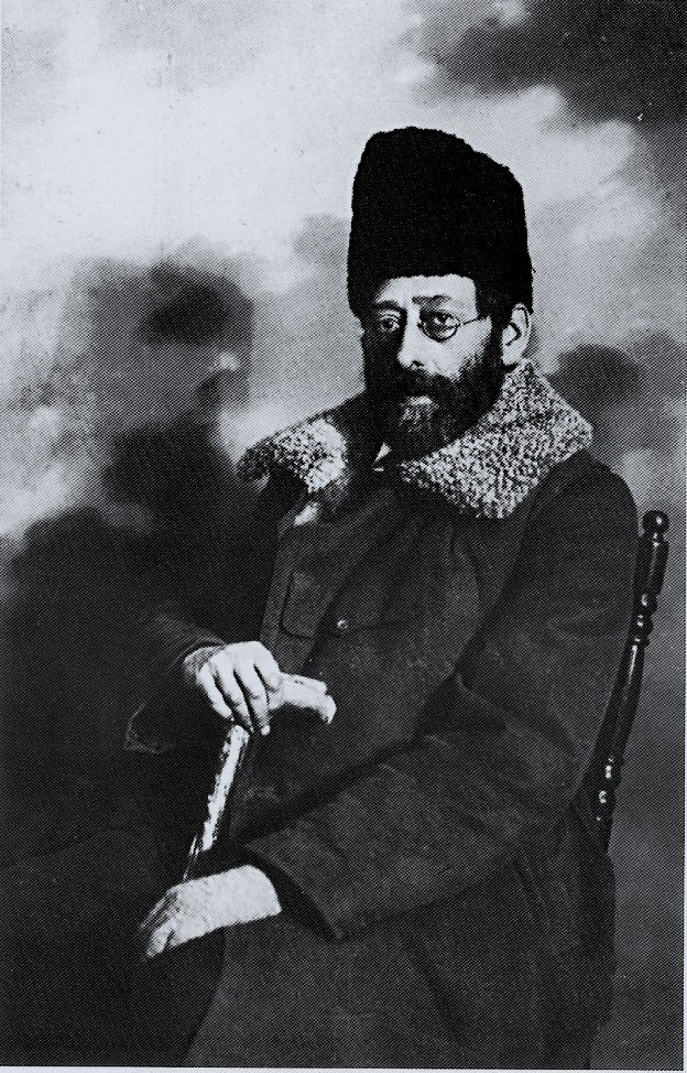 El político menchevique Yuli Martov, retratado en 1917.